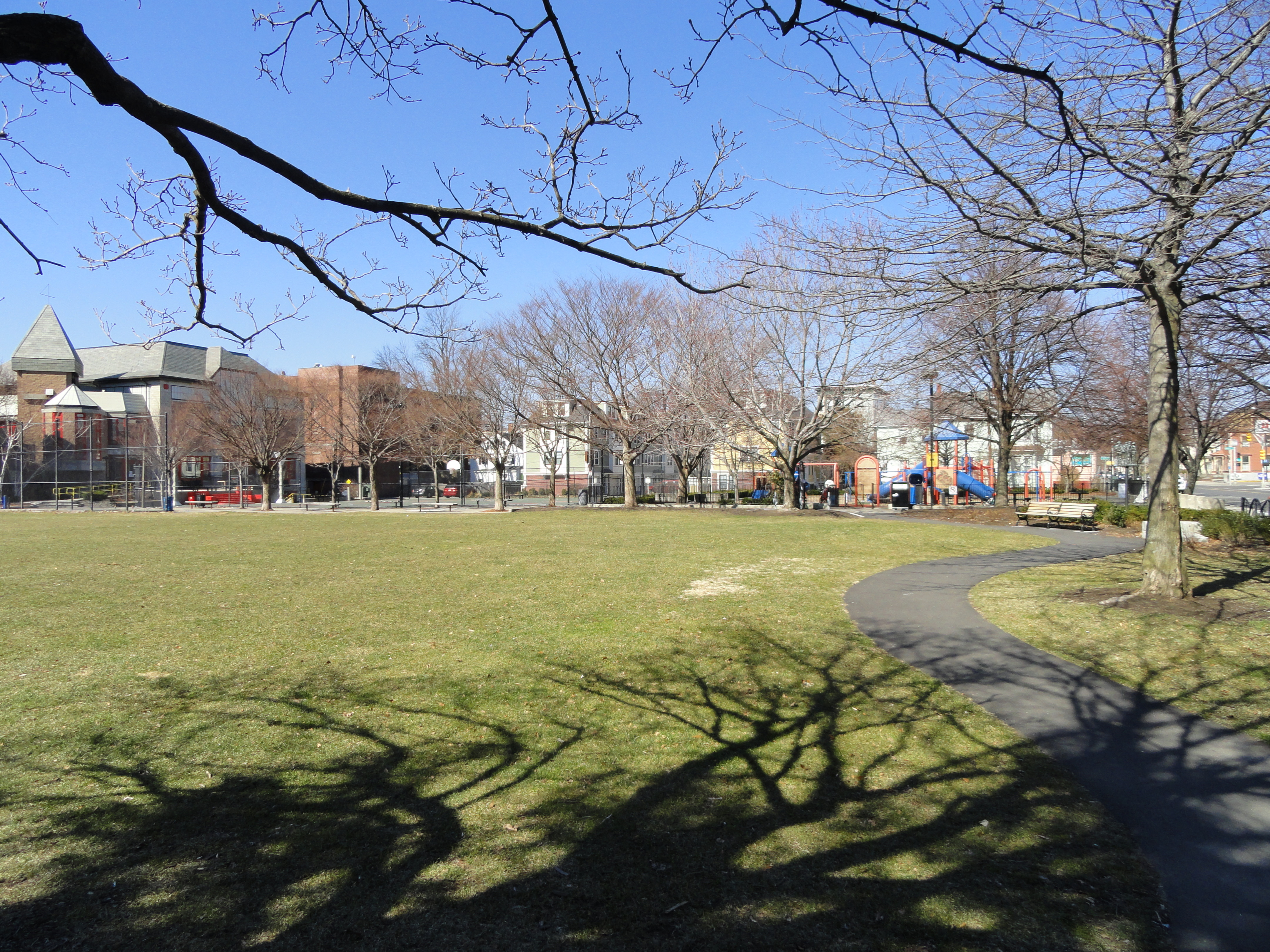 Sennott Park, Cambridge, Massachusetts, USA.